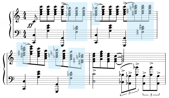 Блюзовые ноты в "Рапсодии" Дж. Гершвина (аналитический фрагмент клавира)